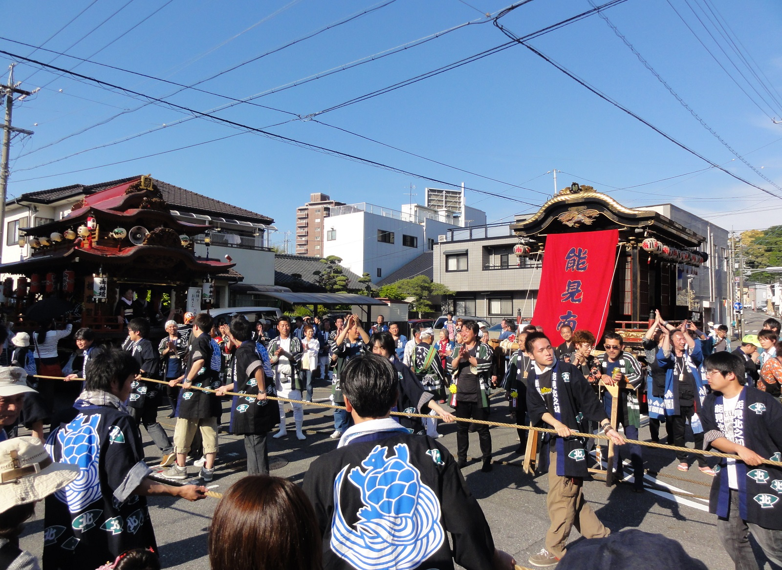 能見神明宮大祭 山車曳き